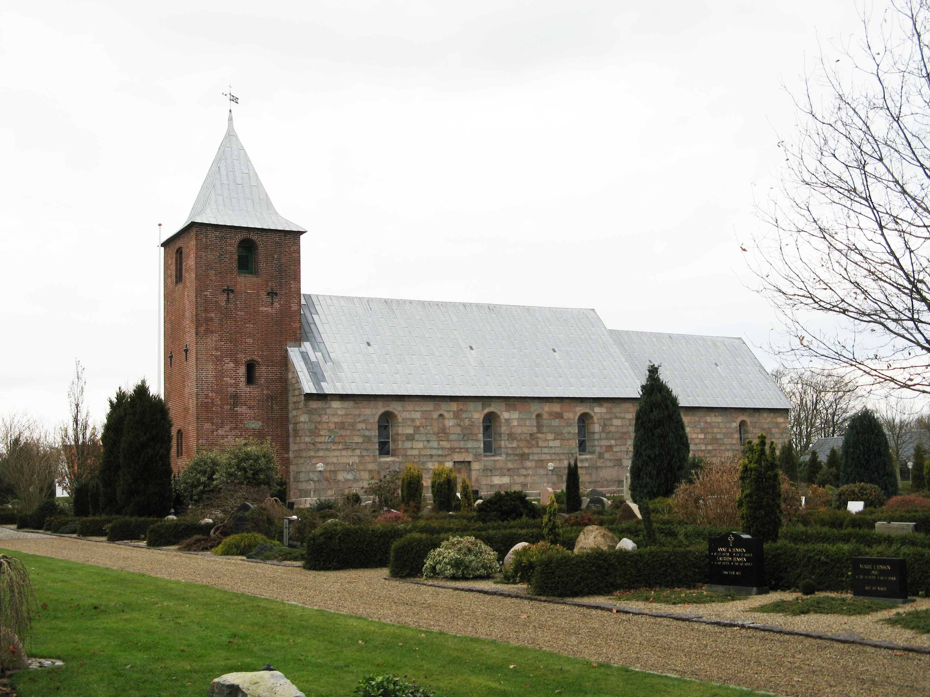 Skads kirke, Skads sogn, Esbjerg kommune (former: Skads Herred, Ribe Amt). Kirken set fra syd